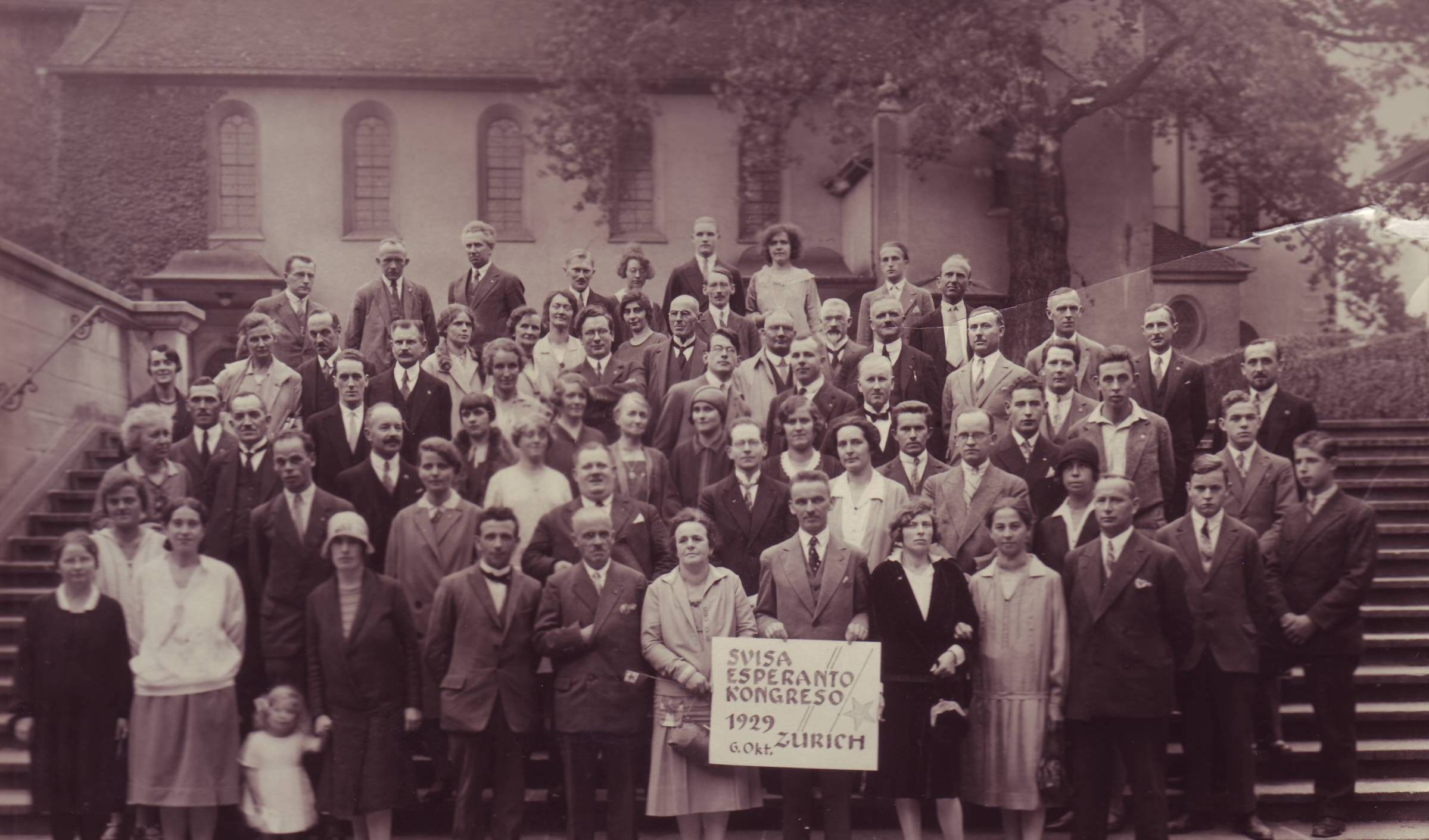 Kongreso de Svisa Esperanto-Societo, 1929, Zuriko, Svislando. Temas pri bildo, kiu estas propraĵo de Svisa Esperanto-Societo. En mia funkico kiel kunprezidanto de SES mi publikigas ĝin ĉi-tie laŭ la kondiĉoj de la GFDL-permesilo de GNU 1.2. Delemont.jpg Kategorio:Bildoj de svisaj esperantistoj Kategorio:Bildoj alŝutitaj de DidiWeidmann